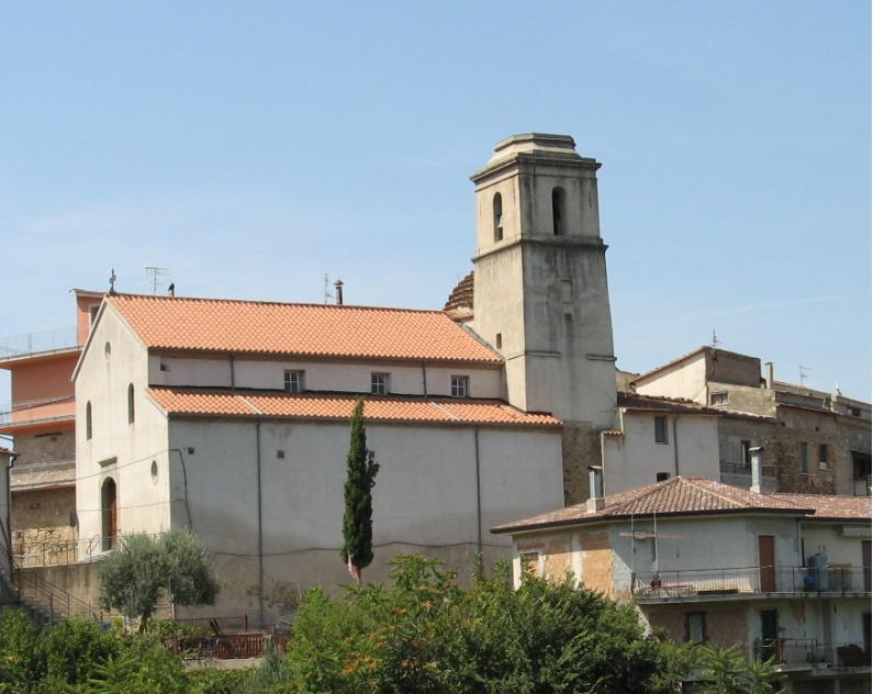 La chiesa di San Matteo in Albanella